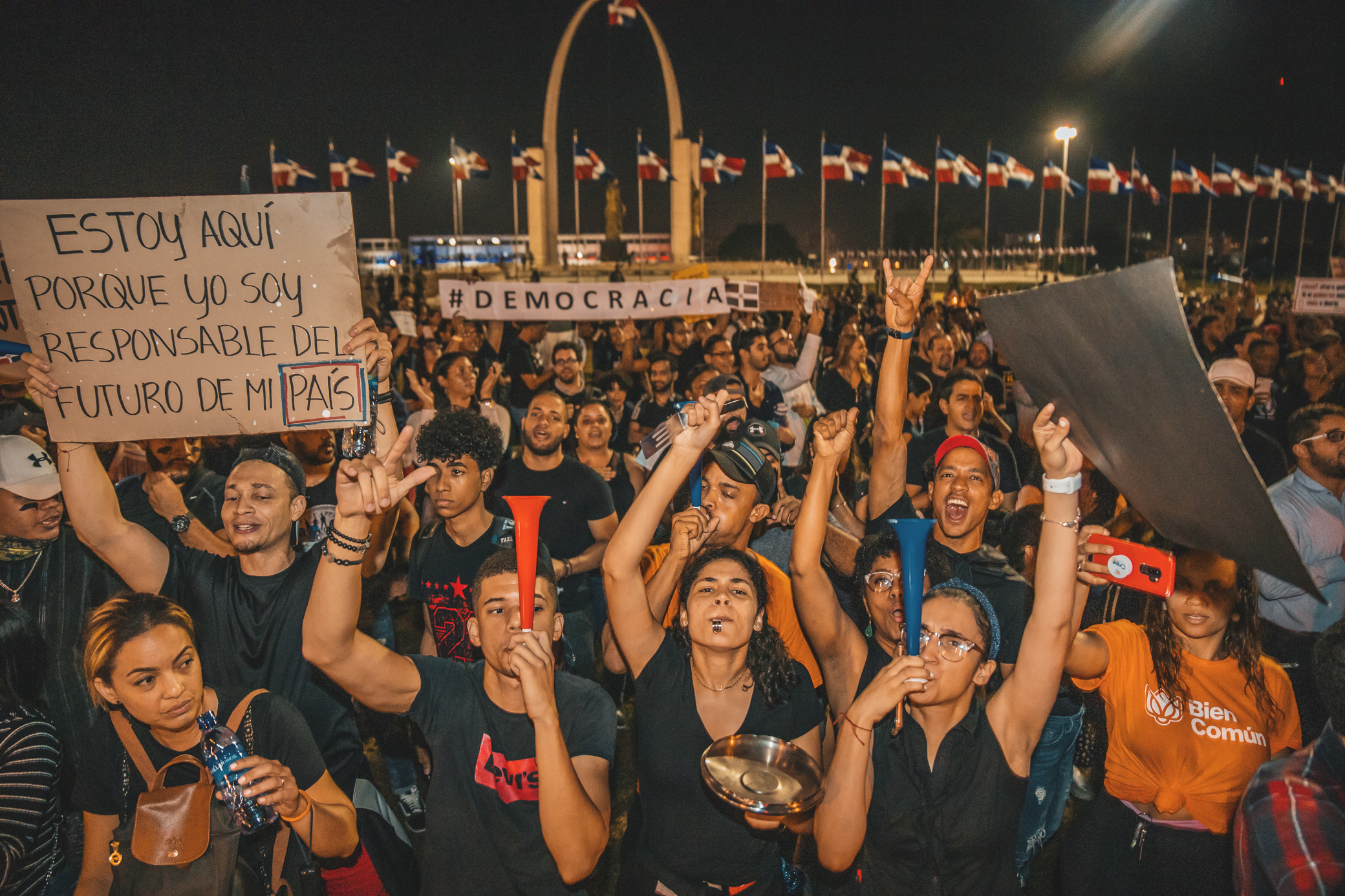 Protestas dominicanas de la Generación del 20